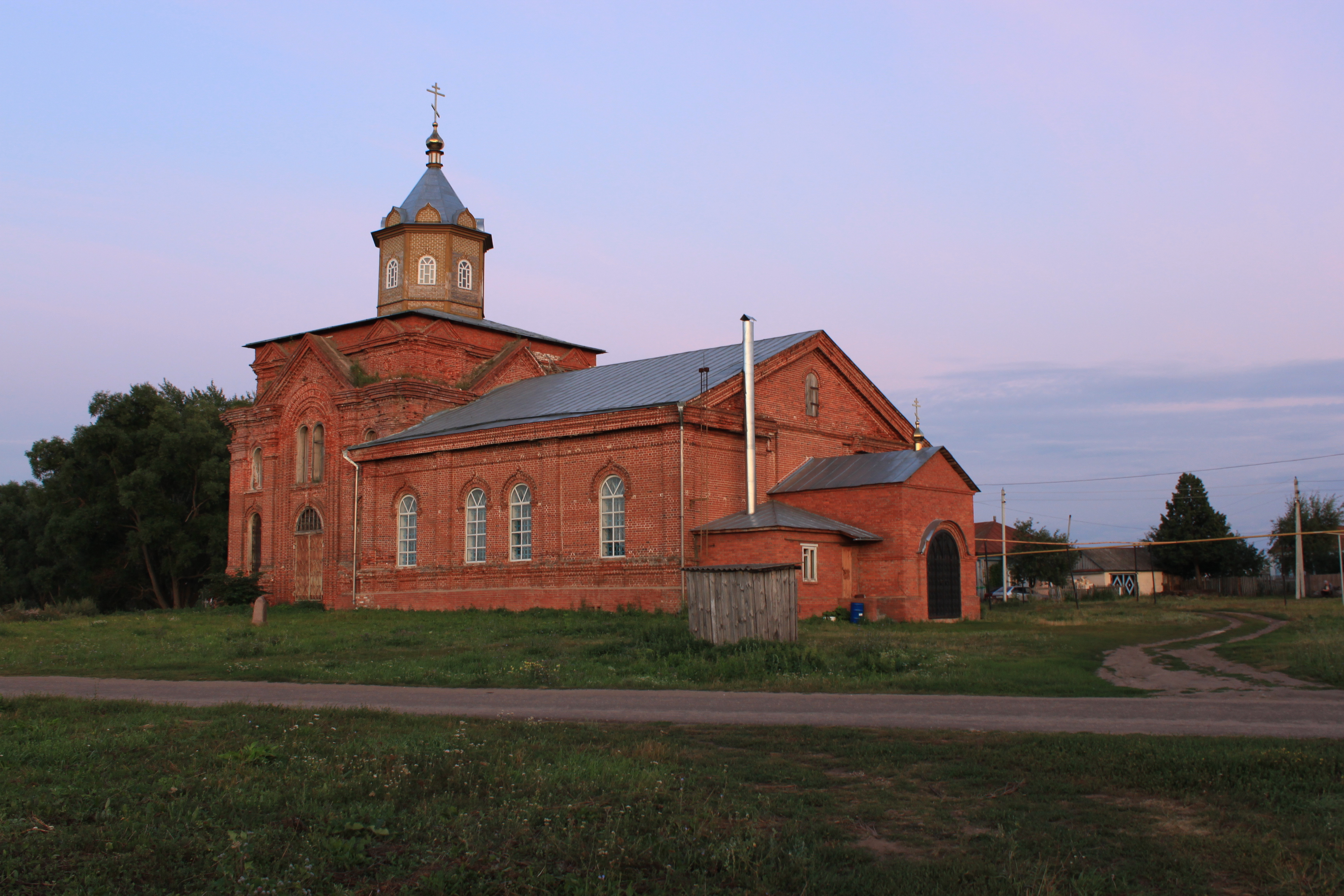 Храм Николы Чудотворца, 1894–1907 гг. в Пешелани